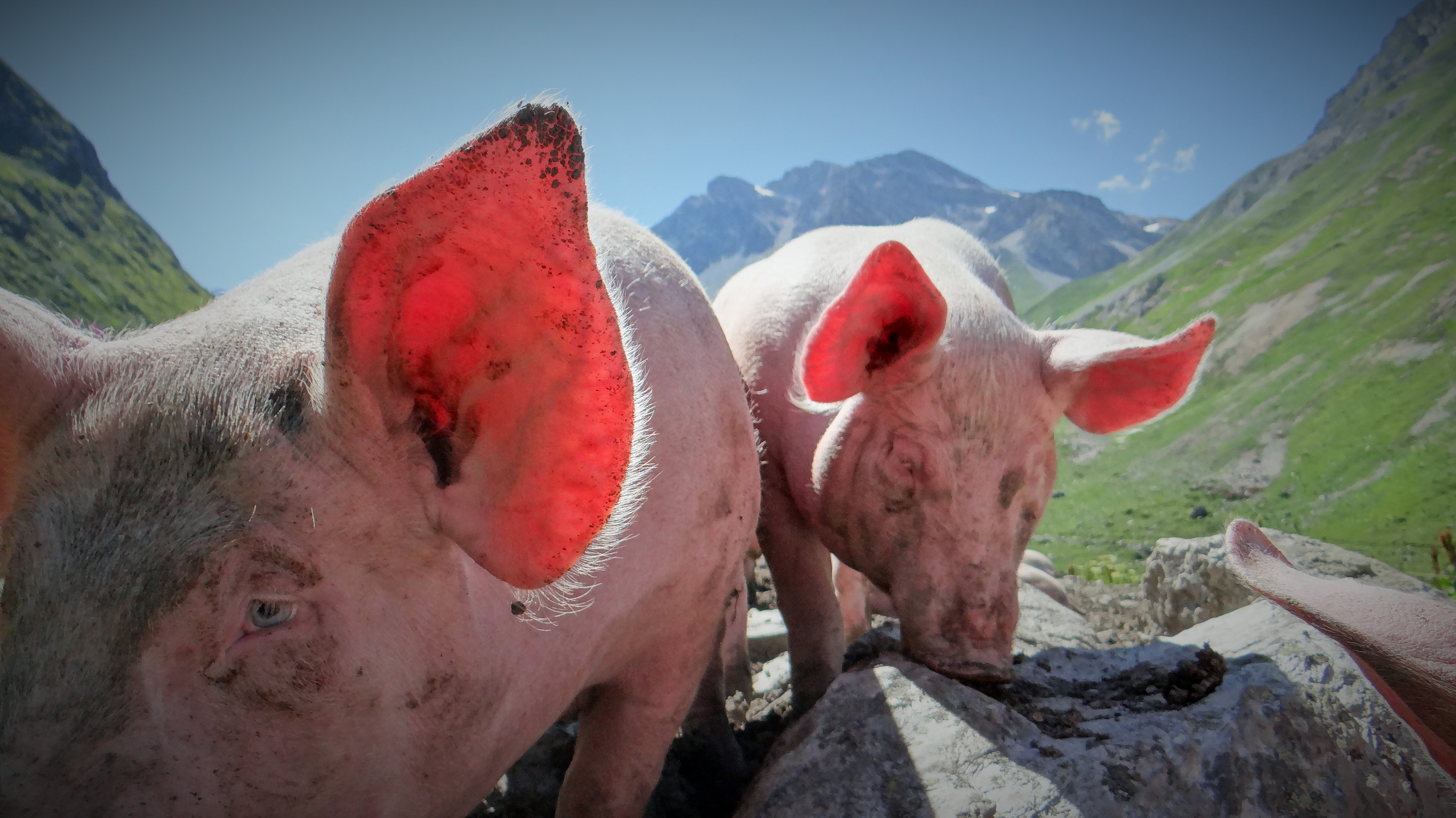 Cochons à l'Alpage du Ritord, nourris au petit lait issu de la fabrication du Beaufort